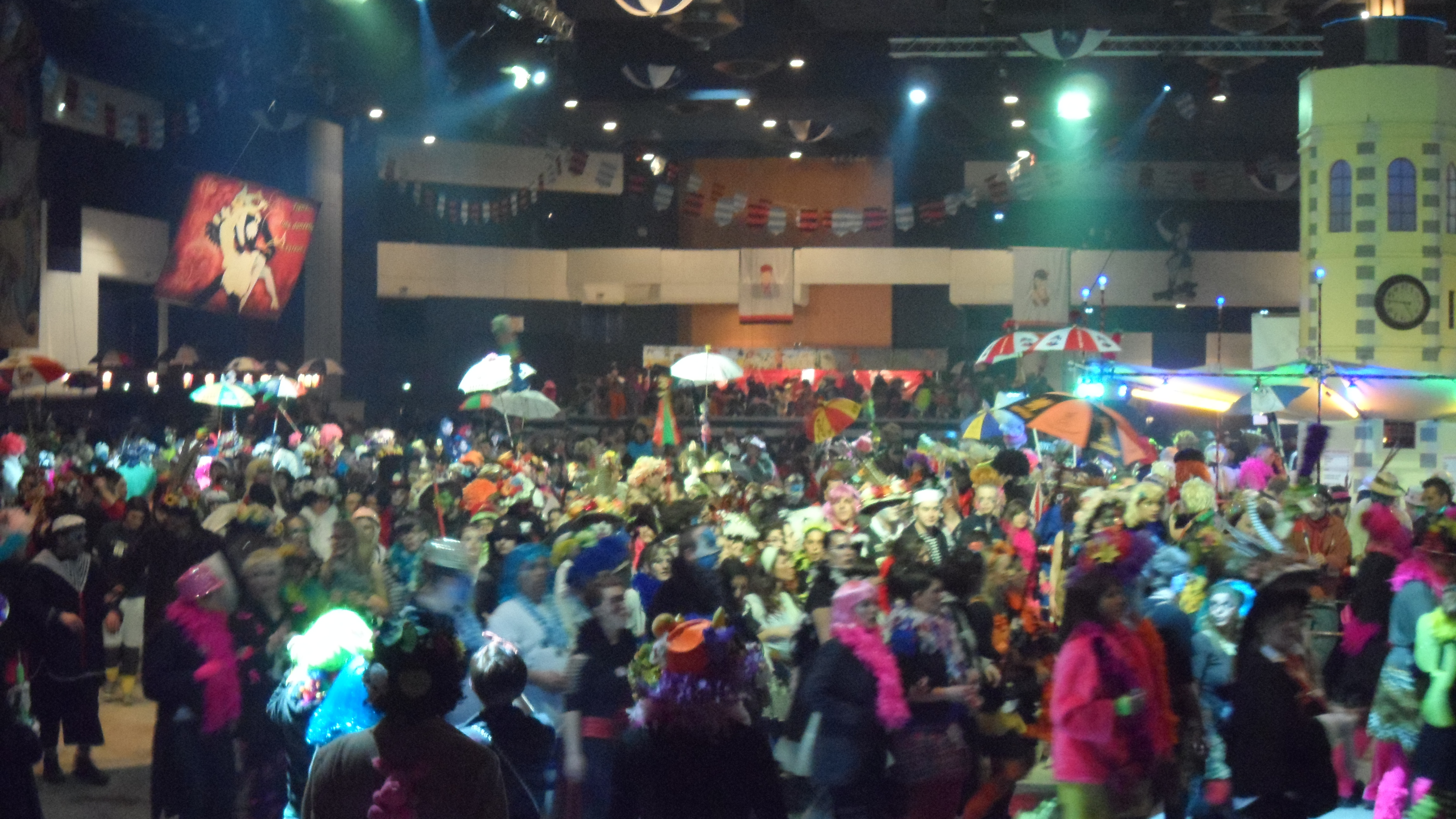 Bal de la Violette 2012